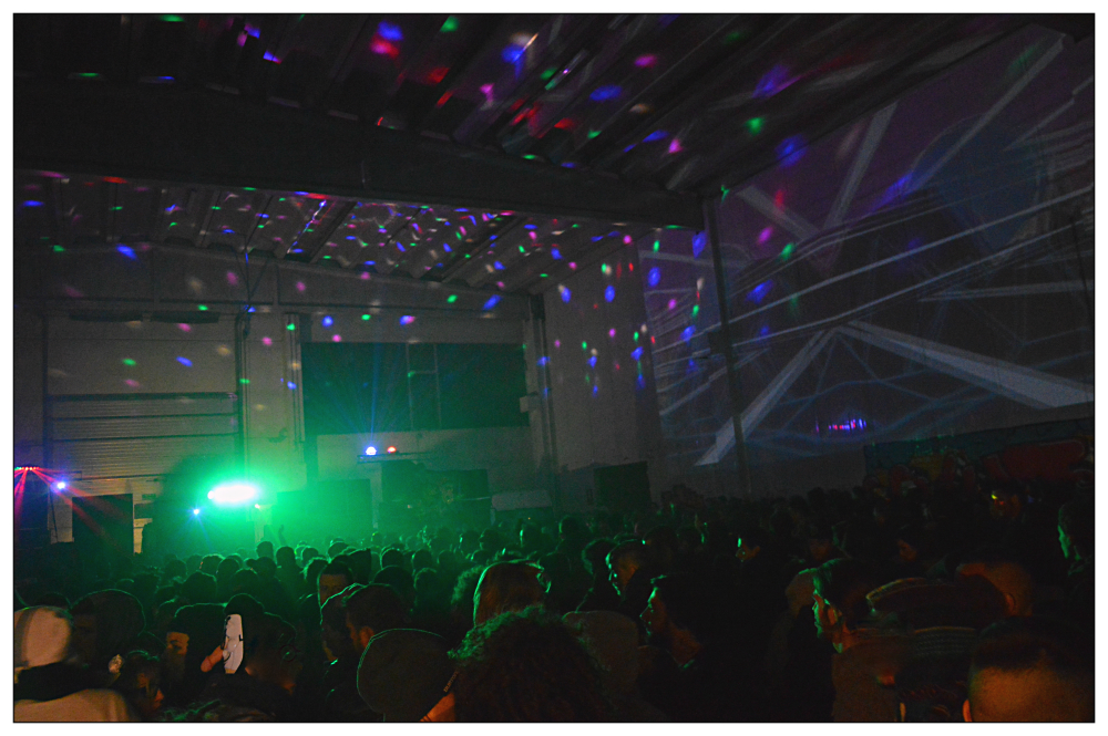 Free party di pasqua in nord italia